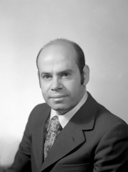 politico, sindacalista e attivista italiano